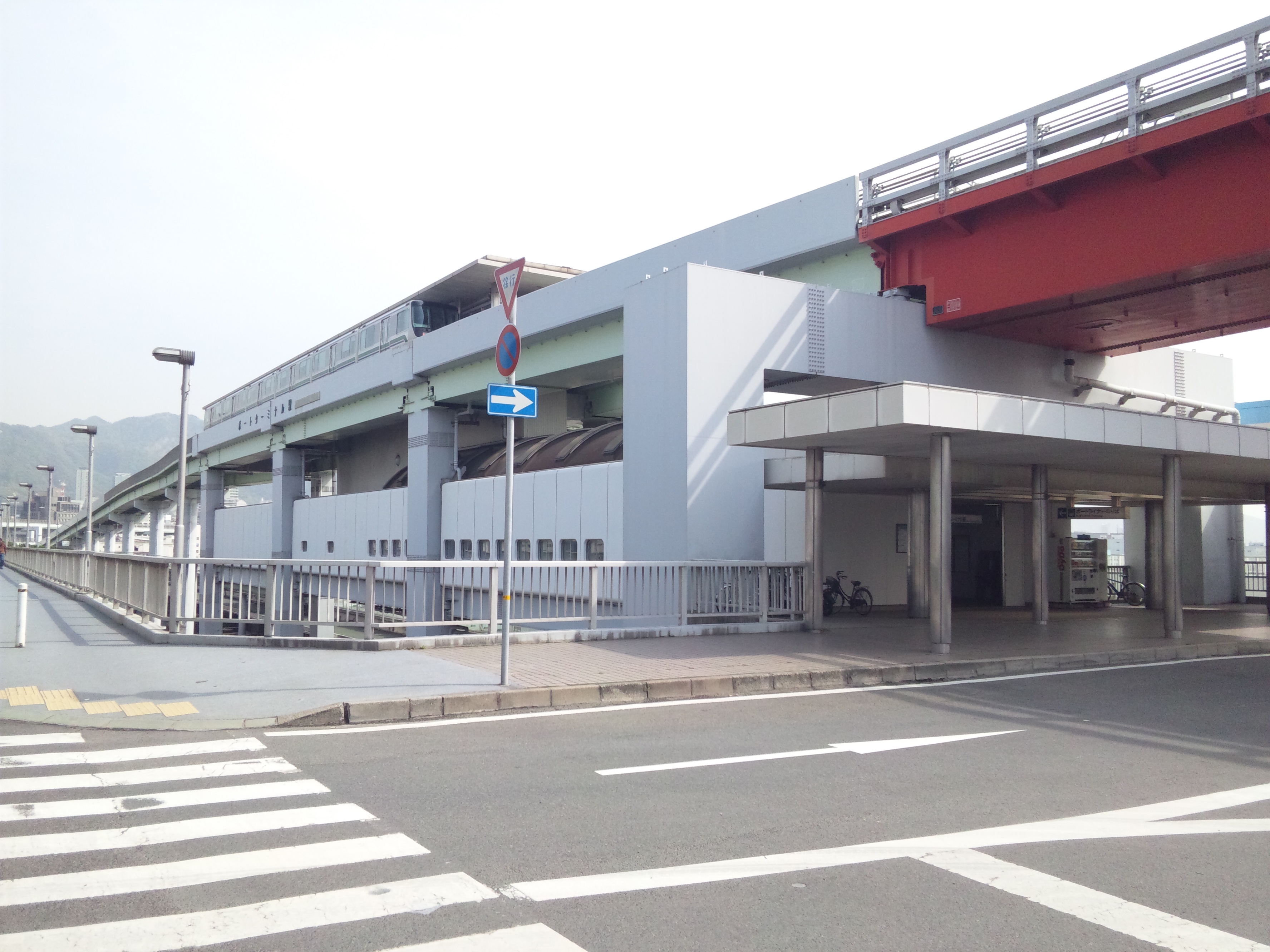 神戸新交通ポートターミナル駅